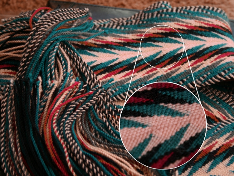 Ceinture fléchée faite à la main en 2007 / Arrow sash handmade in 2007